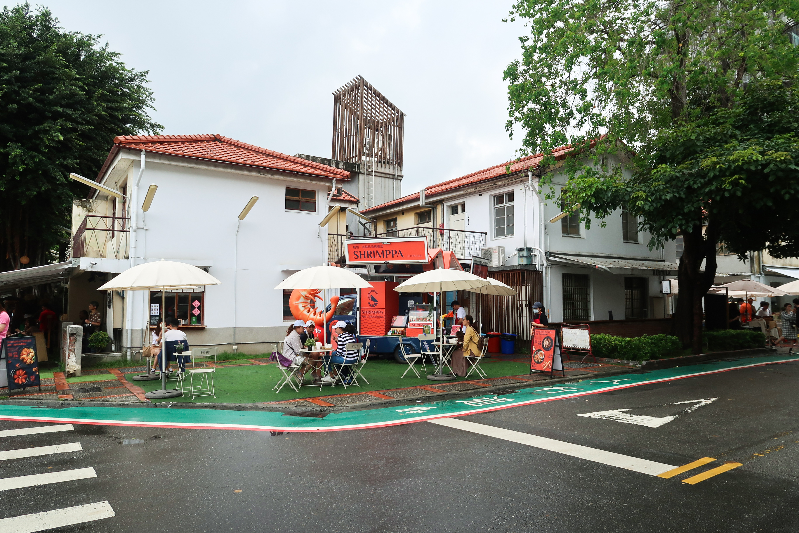 Shenji New Village